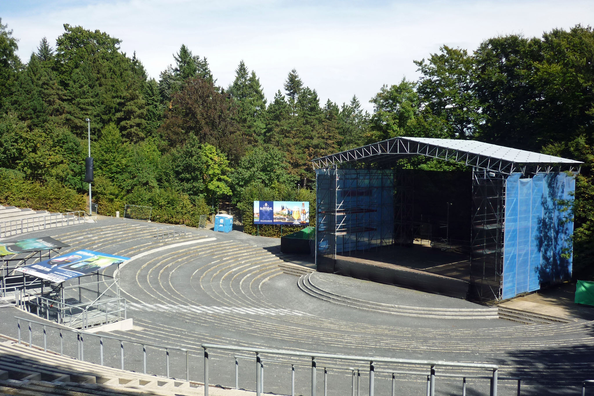 Kamenz, Freilichtbühne auf dem Hutberg